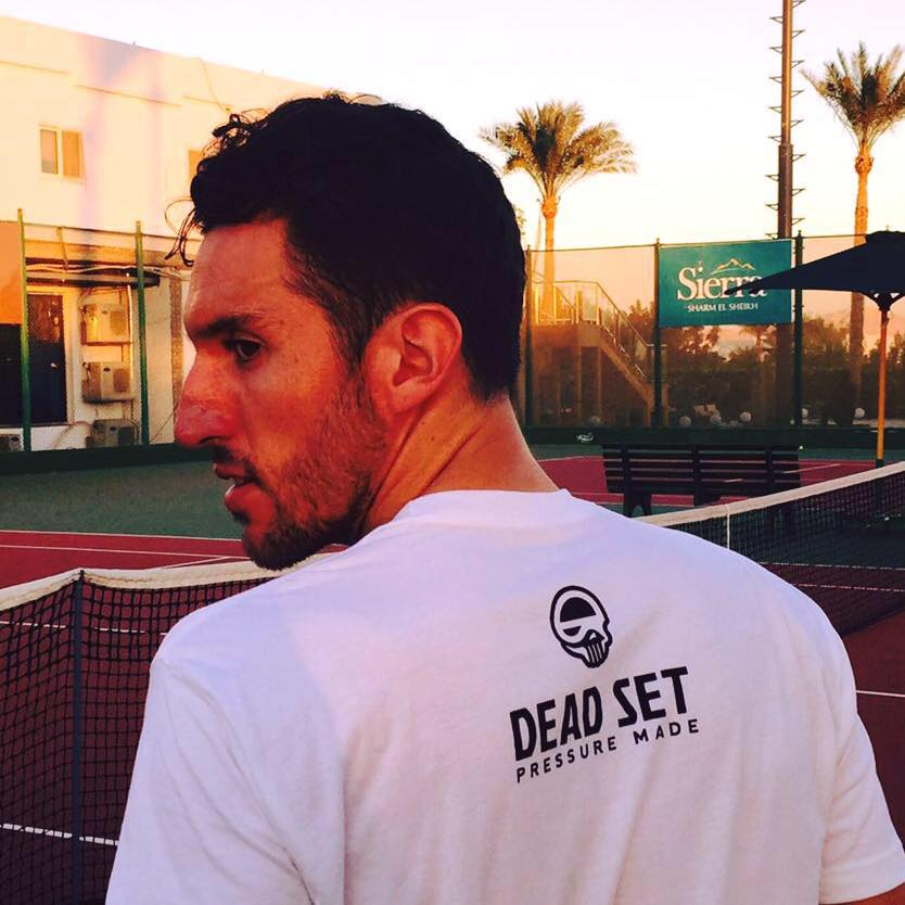 Vasko Mladenov